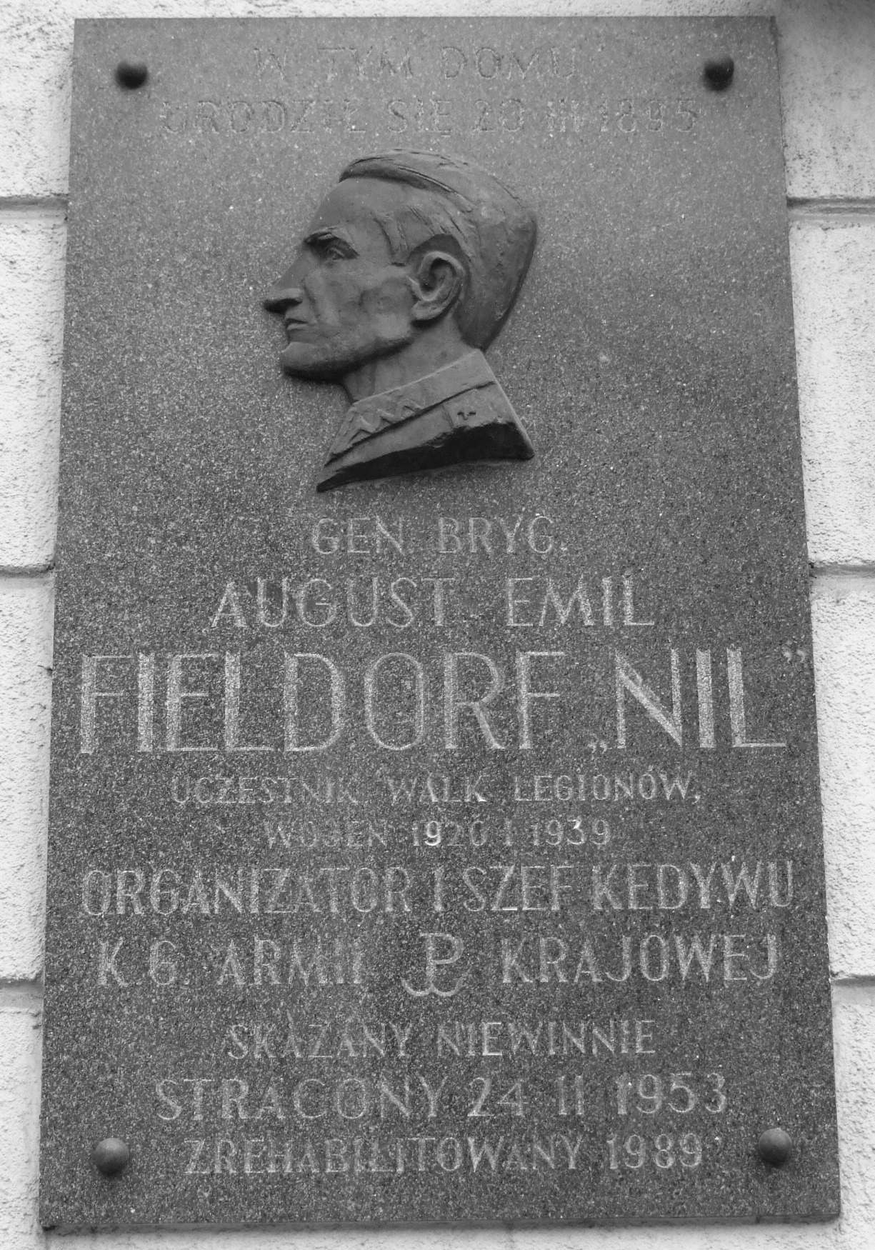 Tablica pamiątkowa na domie przy ul. Lubicz w Krakowie, gdzie urodził się Emil Fieldorf